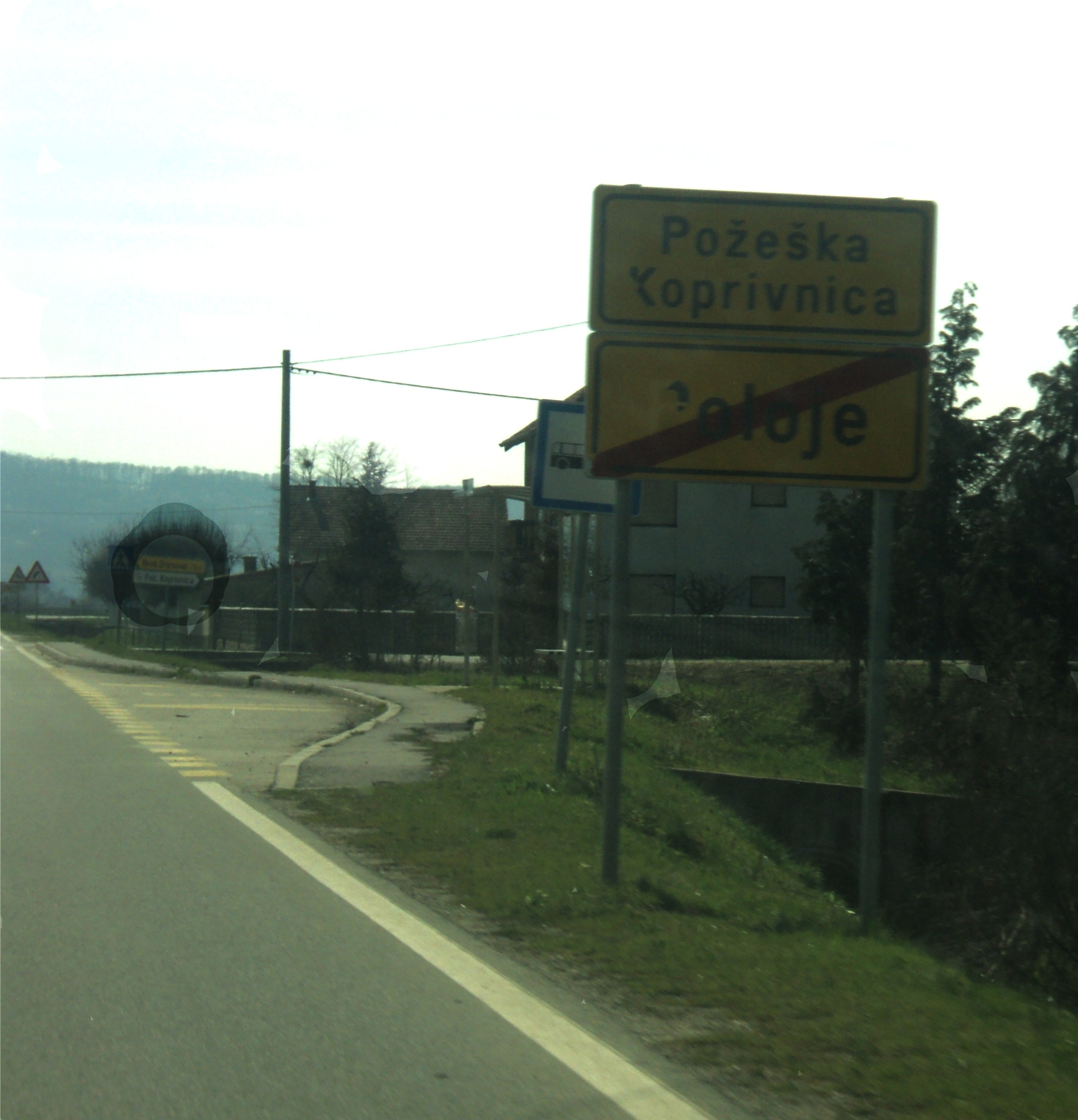 Koprivnice kod Pleternice